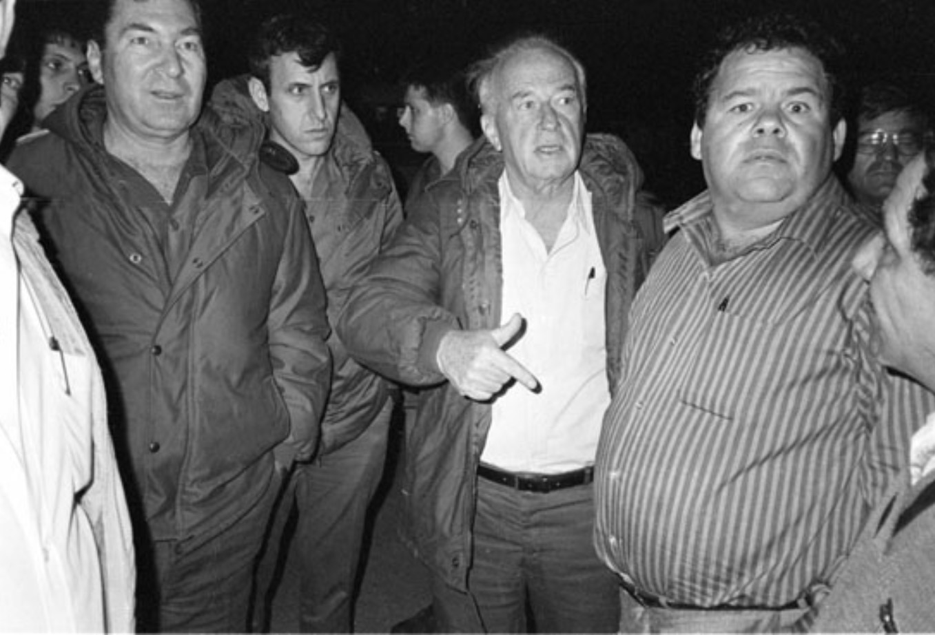 בכירים מגיעים לאזור הפיגוע במחנה גיבור: הרמטכ"ל דן שומרון, יצחק רבין, ראש עיריית קריית שמונה פרוספר עזרן ואחרים.